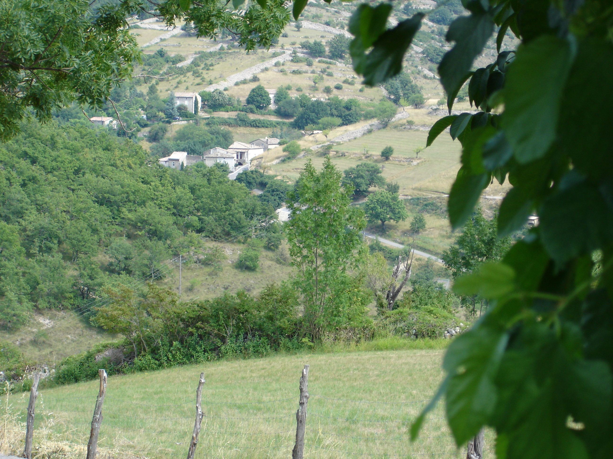 Hameau de ladou - Saint-Andéol-de-Berg - Ardèche - France